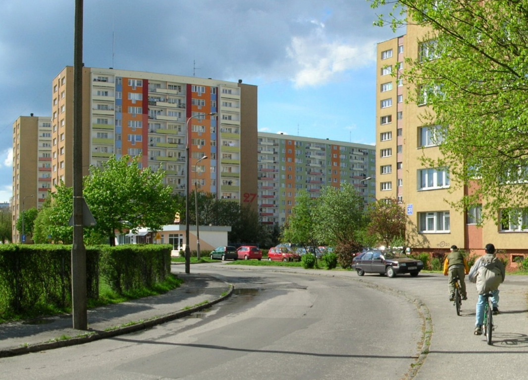 Osiedle Wyżyny w Bydgoszczy